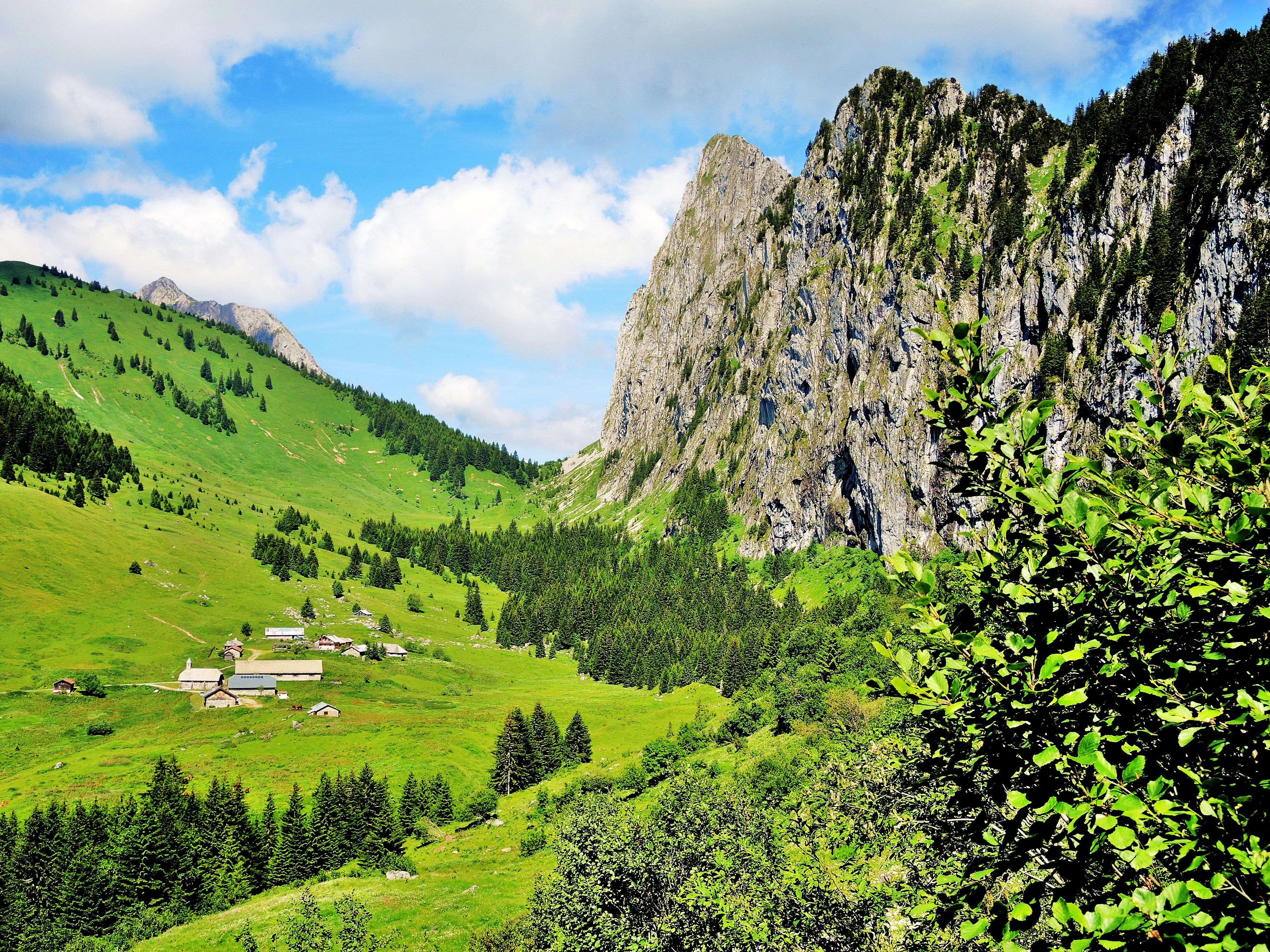 Ubine et col d'Ubine.